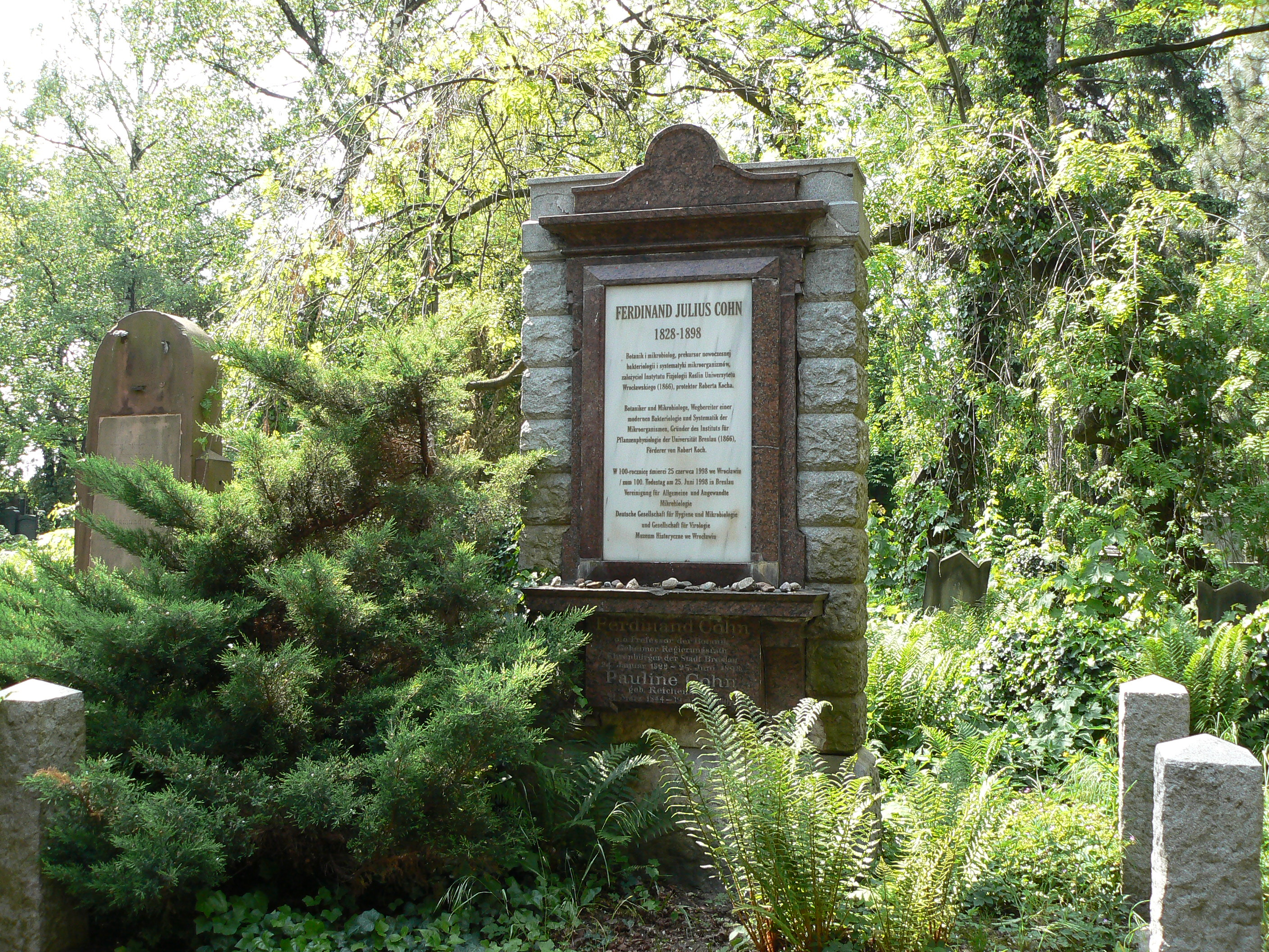 Grób Ferdinanda Juliusa Cohna